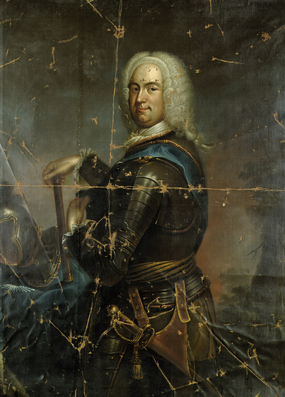 Bildnis Ferdinand Albrecht II. von Braunschweig-Wolfenbüttel (1680-1735), kaiserlich österreichischer Feldmarschall.